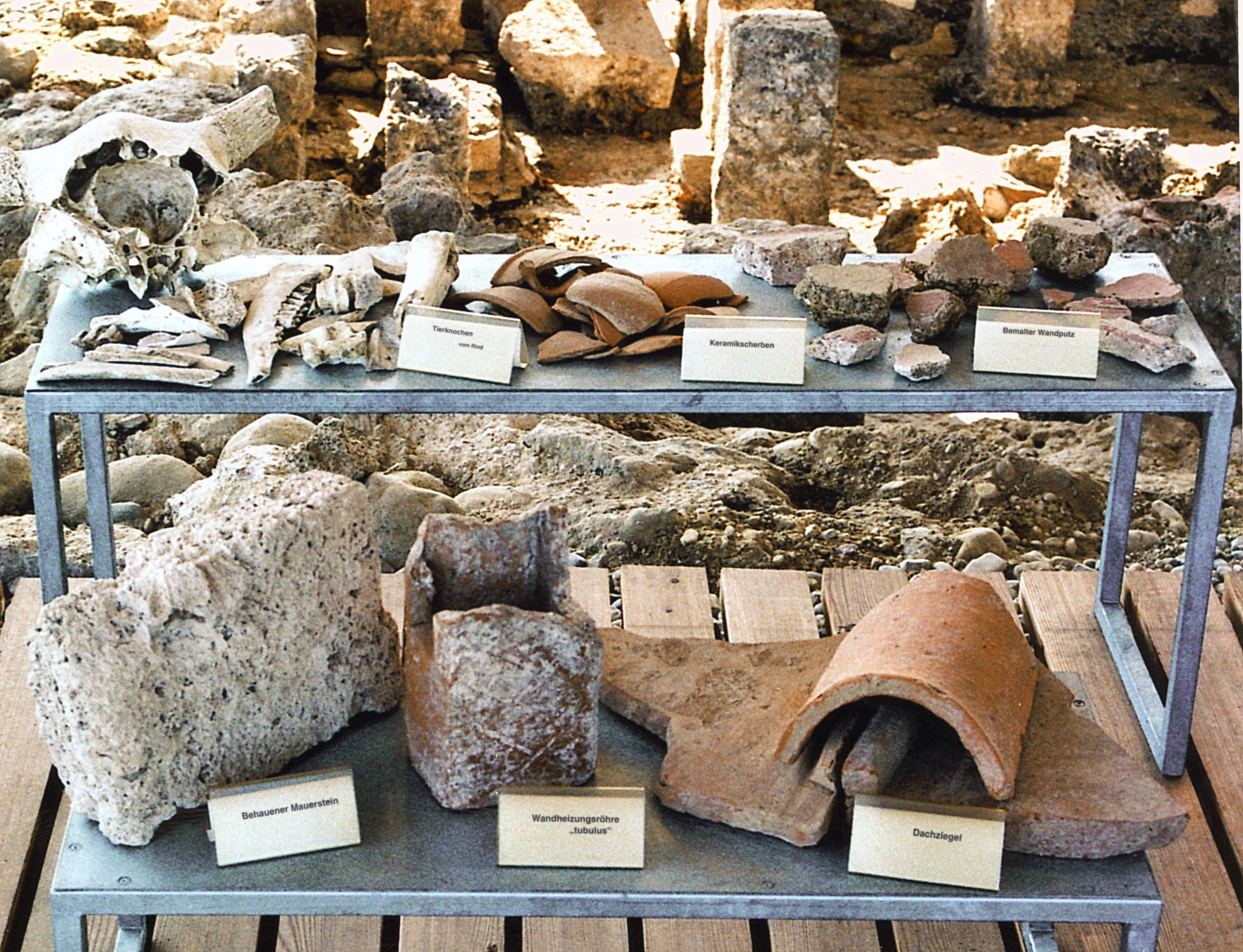 2001/02 entdecktes Fundgut aus dem Haupthaus und dem Brunnen der Villa Rustica bei Leutstetten, Oberbayern.